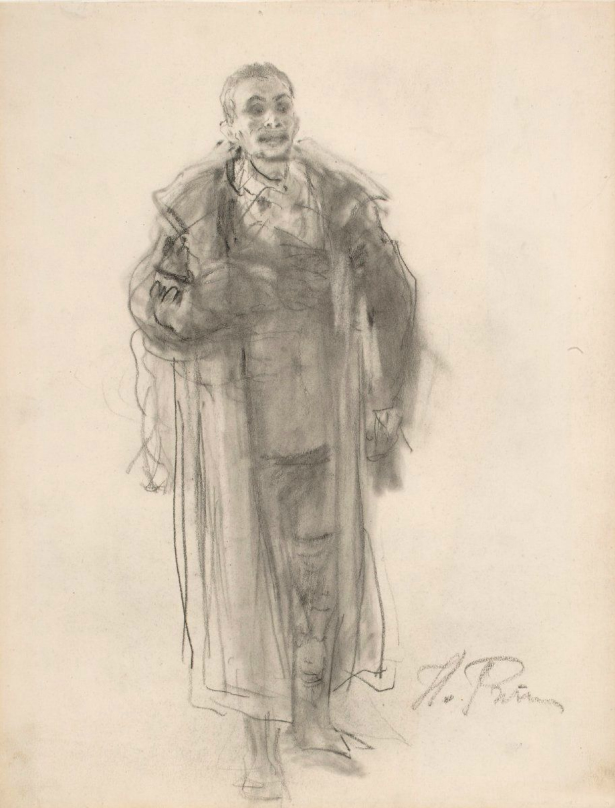 Ilia Répine Dessin préparatoire pour la toile Visiteur Inattendu (1884)